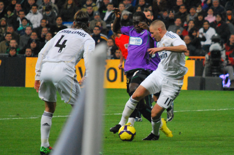 Real Madrid 2 - Malaga 0 24 enero 2010